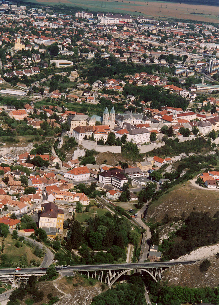 Veszprém - Veszprém megye - Hungary - Europe